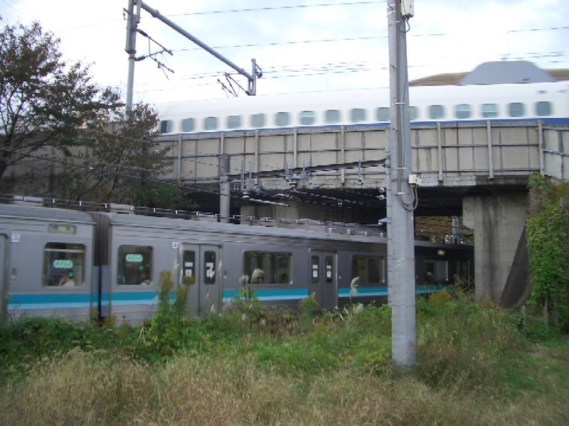 Intersection of JR Sagami Line with Tokaido Shinkansen near Kurami Station, Samukawa, Kanagawa